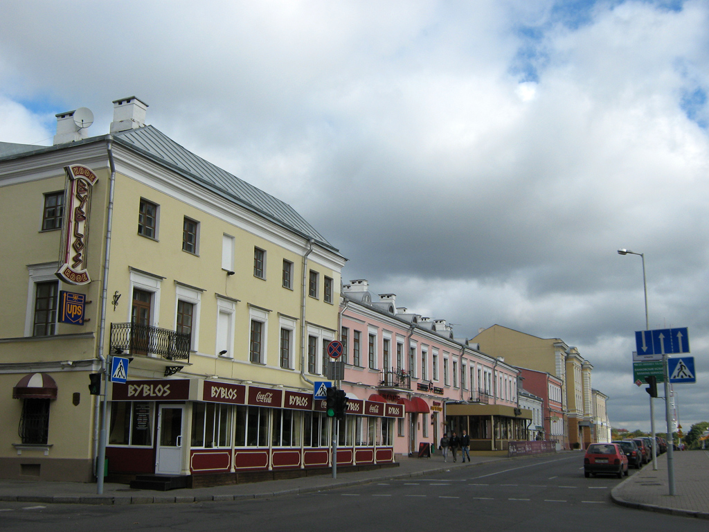 Мінск. Вуліца Інтэрнацыянальная, 21, 23